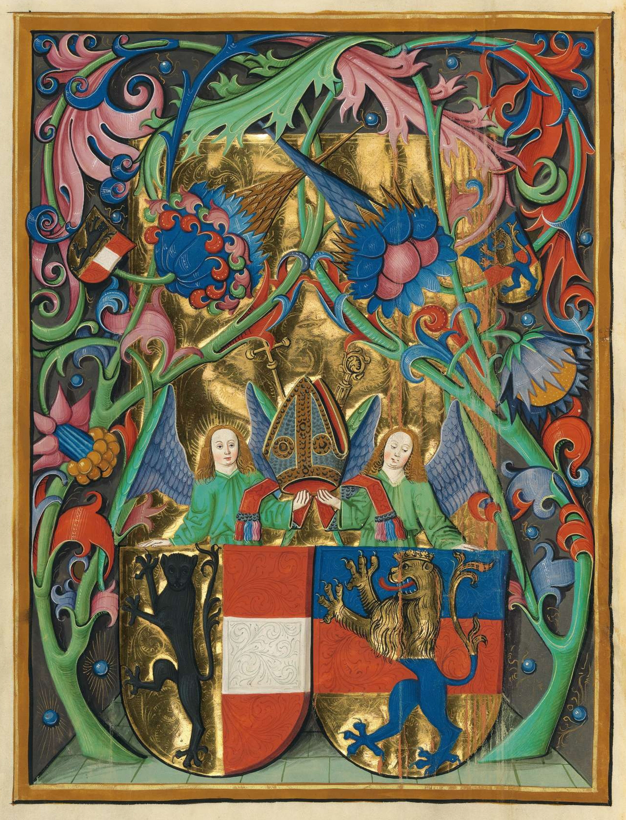 Wappen des Erzbistums Salzburgs und des Bischofs Johann Beckenschlager